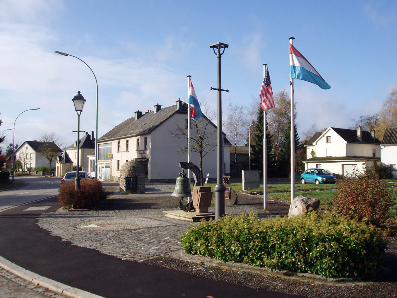 Monuments à Marnach (Luxembourg)